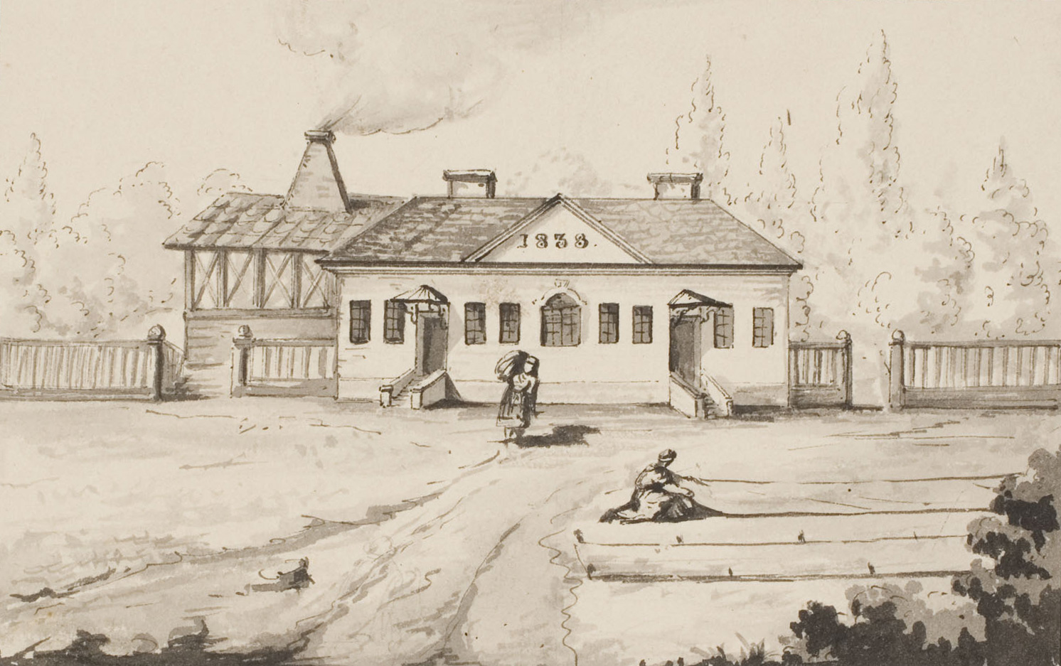 Беларуская (тарашкевіца): Лагойск (Łahojsk), рог вуліц Плешчаніцкай (vulica Pleščanickaja) і Мікольскай (vulica Mikolskaja). Палатняная фабрыка